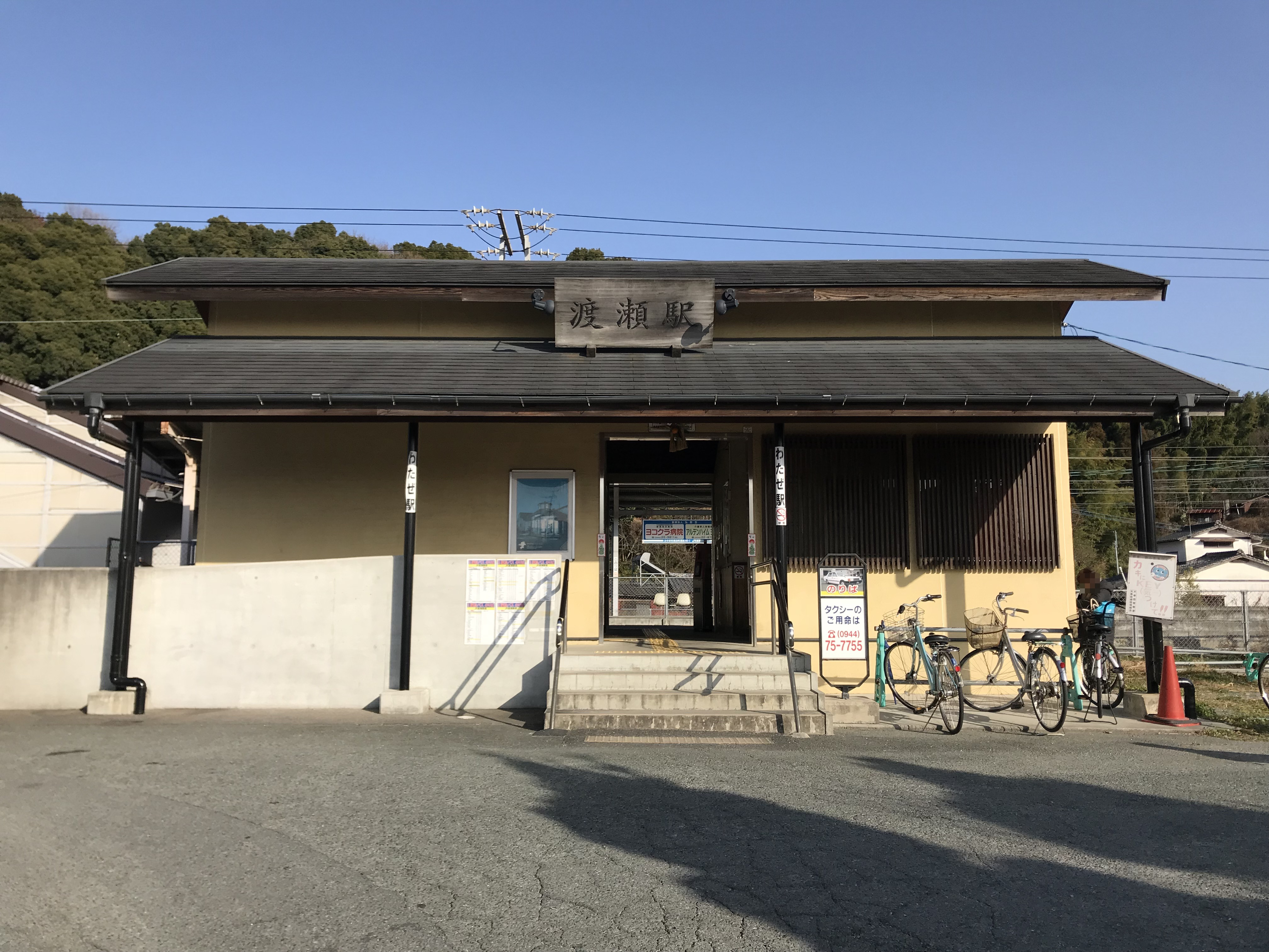 渡瀬駅の駅舎